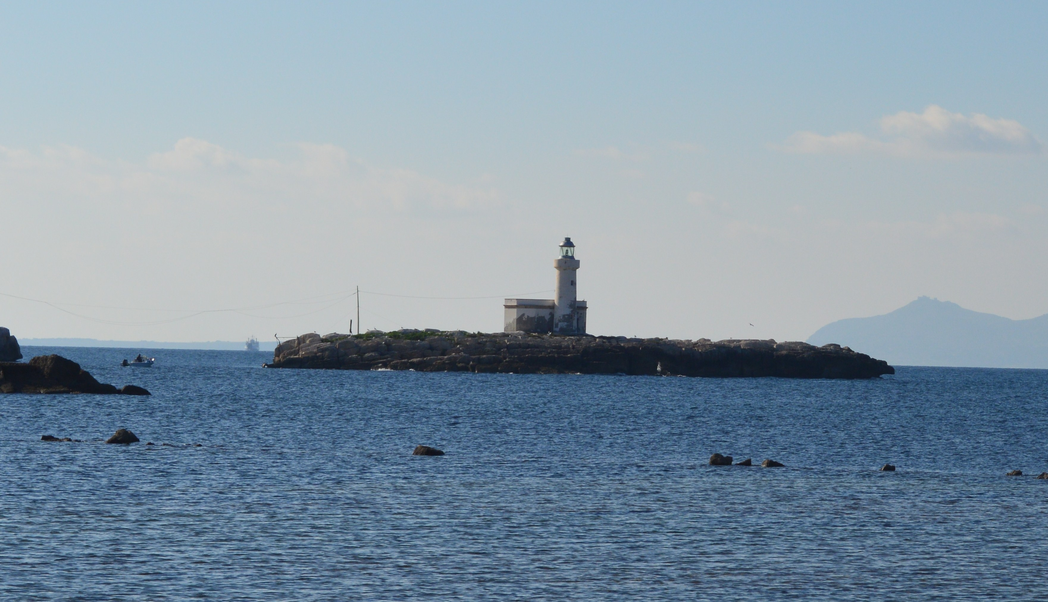 Scoglio Palumbo con faro (trapani)